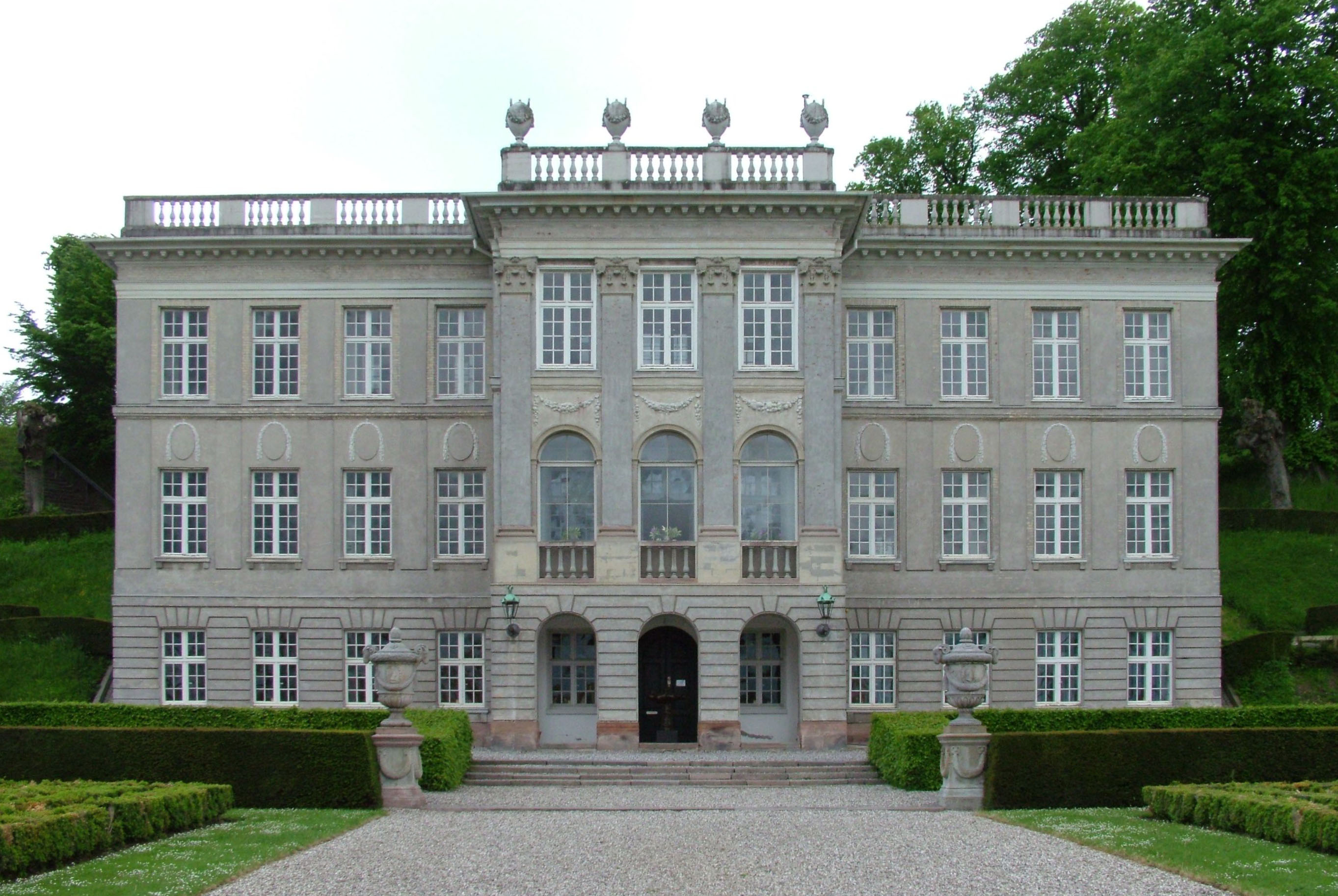 Helsingør, Dänemark, das Schloss Marienlyst, das Schloss liegt im Ost der Stadt. Es ist 1588 gebaut worden.